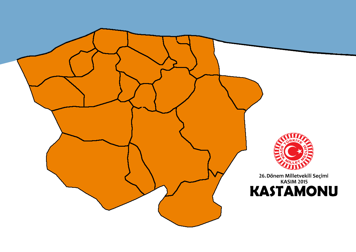 Kasım 2015 seçimleri